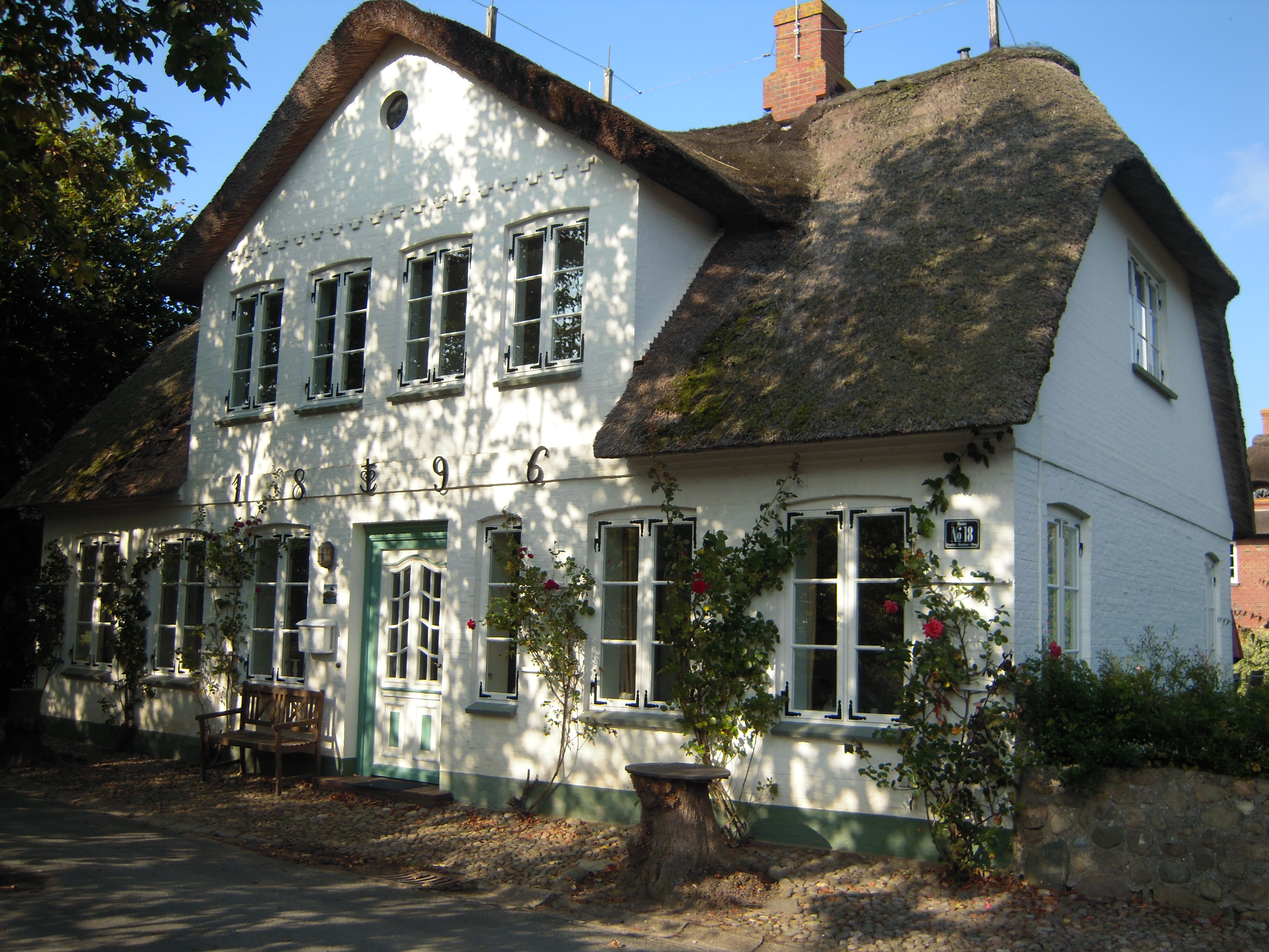 Denkmalgeschütztes Kapitän-Knudsen-Haus in Wyk auf Föhr, Ortsteil Boldixum. Das Gebäude dient heute als heute als Ferienhaus.